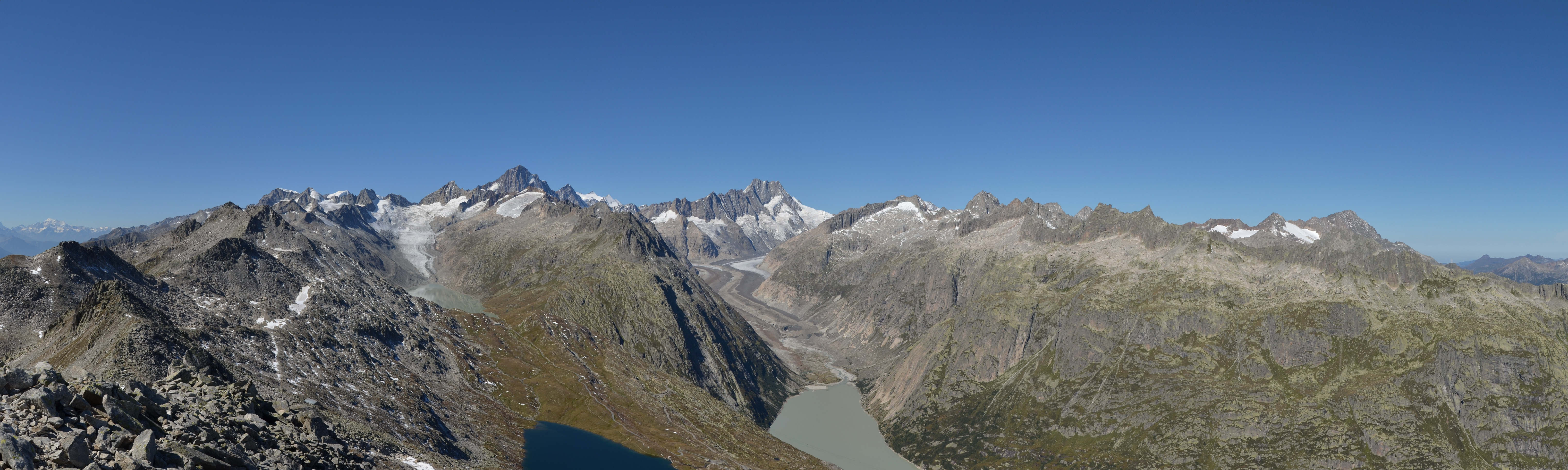 Blick vom Sidelhorn Richtung Finsteraarhorn und Lauteraarhorn